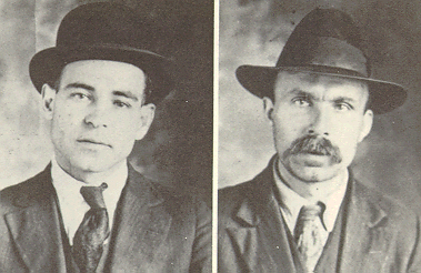 Immagine di Nicola Sacco e Bartolomeo Vanzetti ampiamente diffusa sul web e sicuramente antecedente al 1927 Sacco e Vanzetti